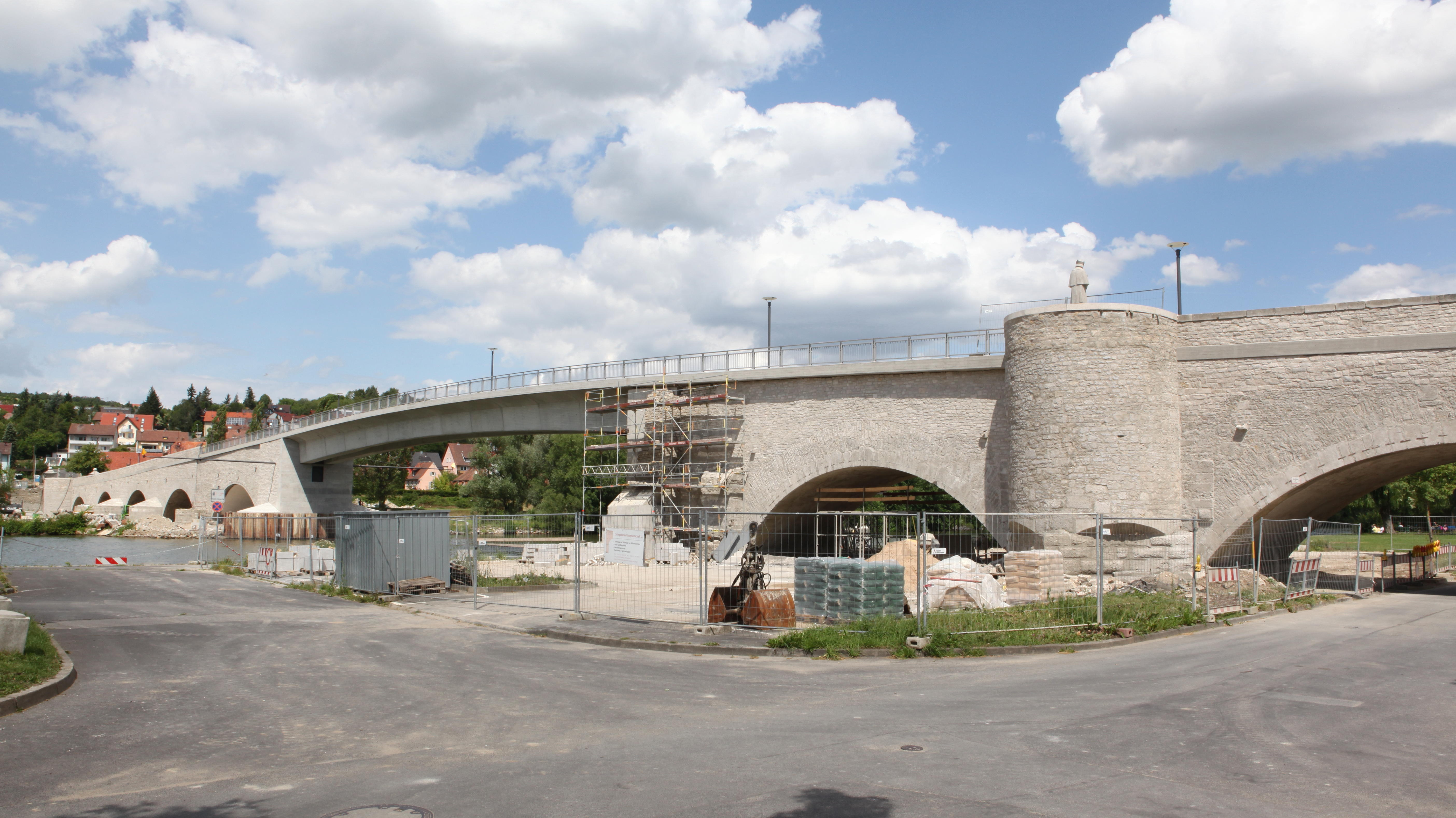 Alte Mainbrücke Ochsenfurt, Landkreis Würzburg